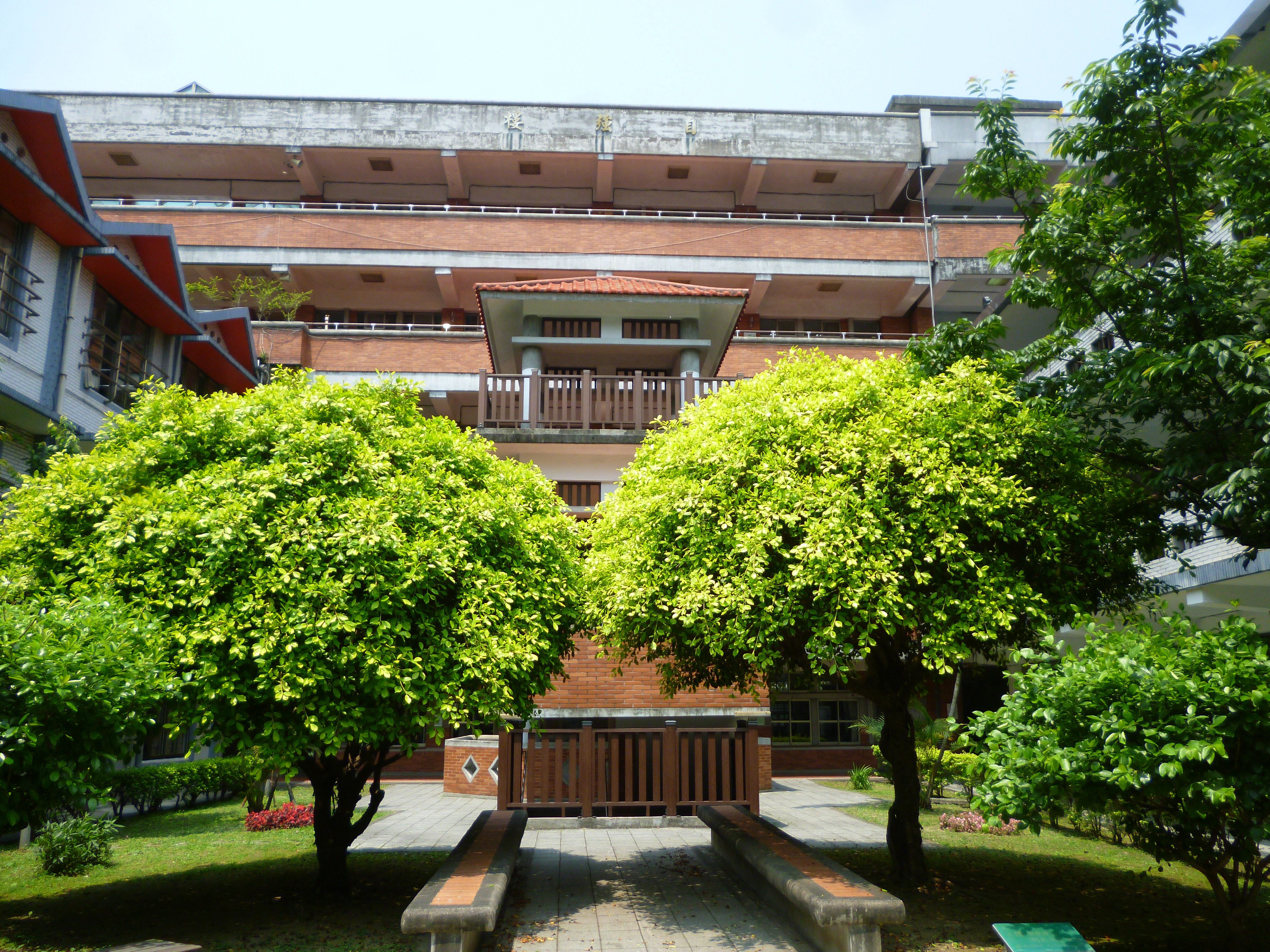 興建完成的自強樓外觀